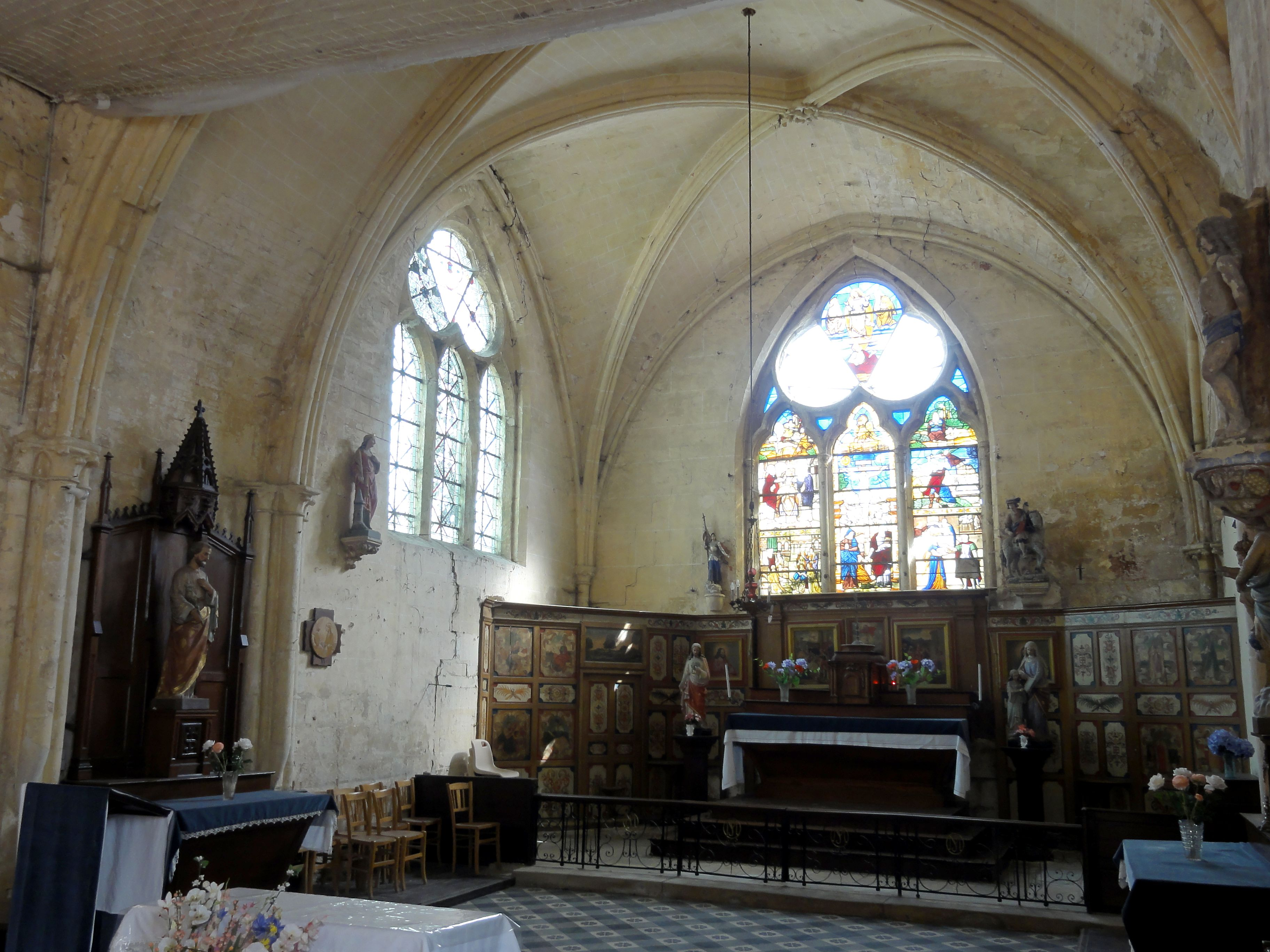 Chœur.